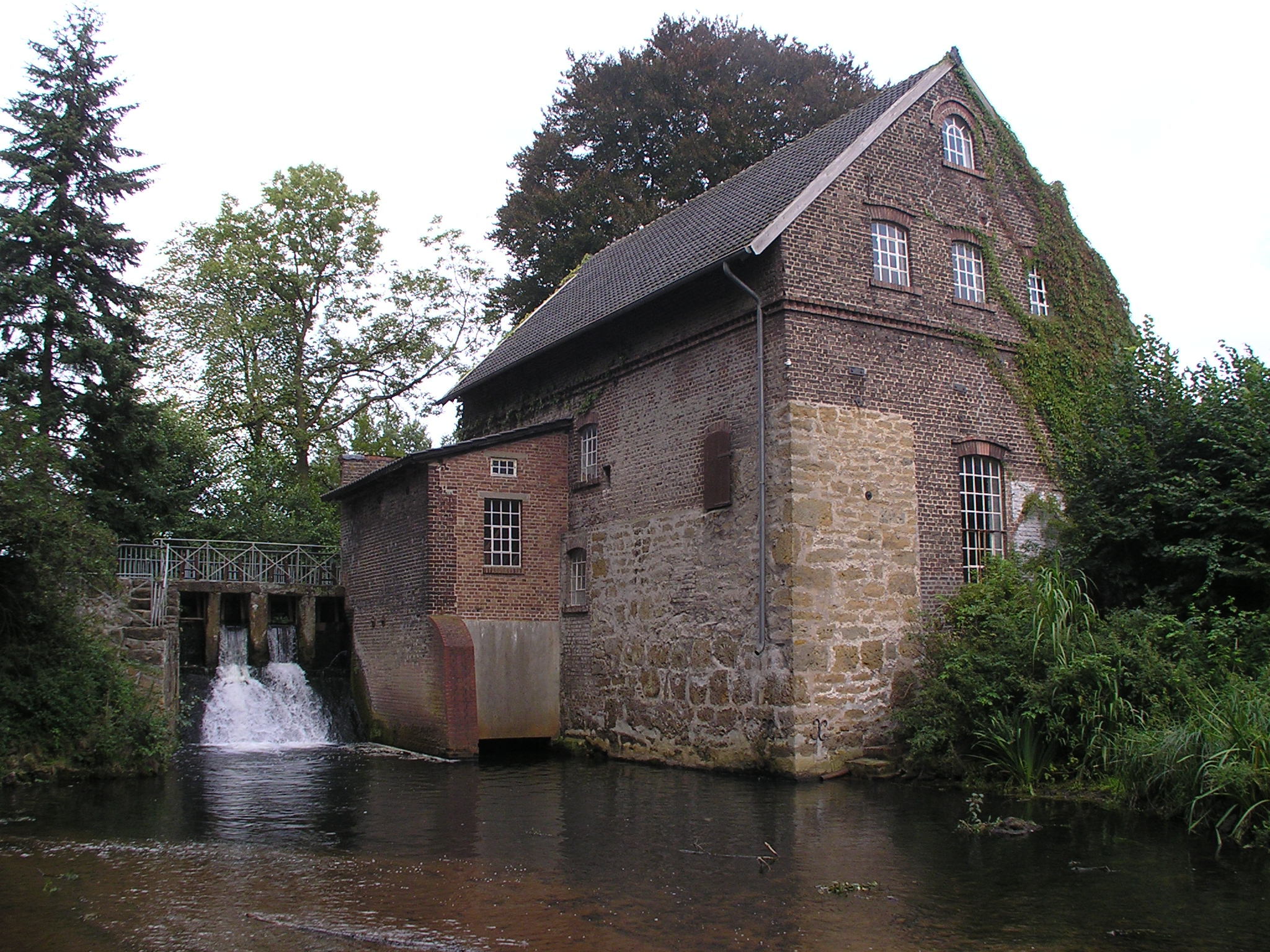 Watermill Tüshaus-Mühle in Dorsten, Germany